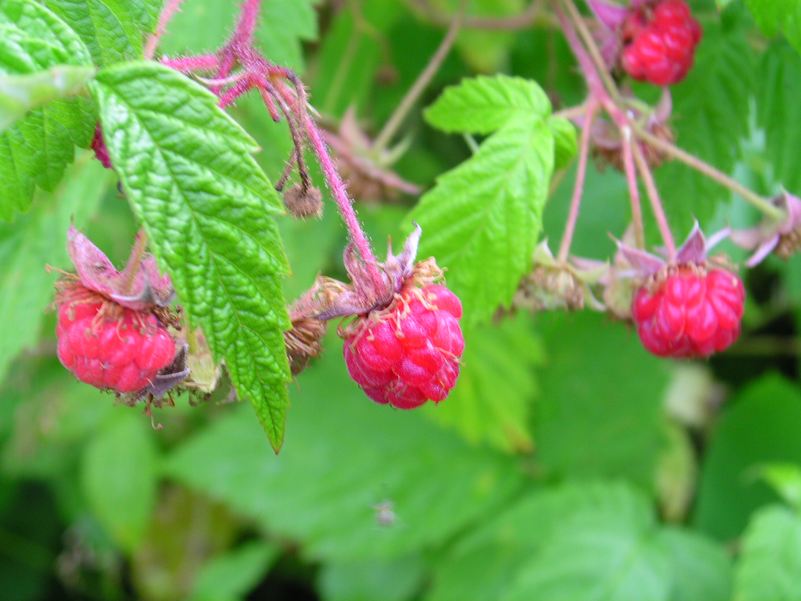 Rubus strigosus 1